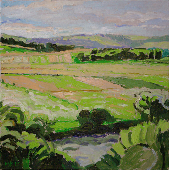 San pod Przemyślem, Marek Mikrut, 2011 r.